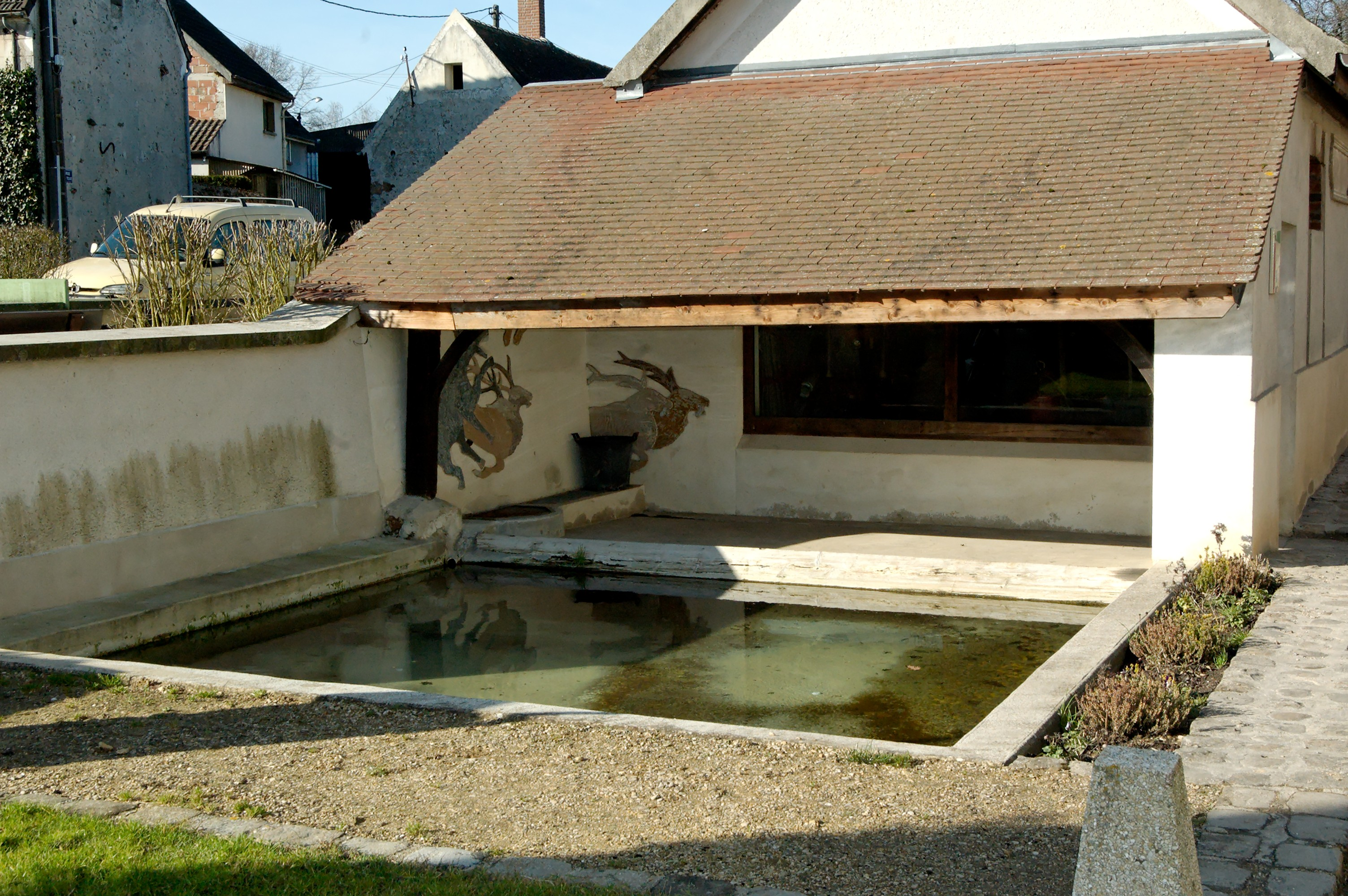 Un lavoir illustré par la fable Le lion et l'ane chassant.